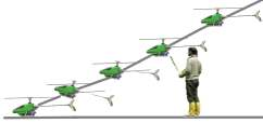 RC-Modellhubschrauber Flugmanöver "Landen"